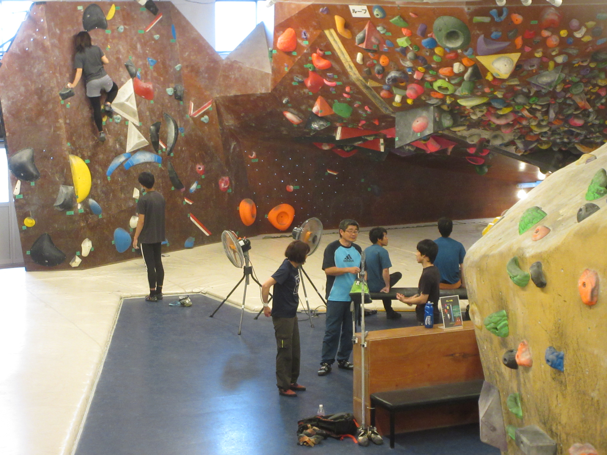 ロッククライミングのジム、「プレイマウンテン！」。岡崎市大平町